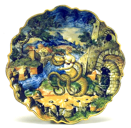 Piatto istoriato con la rappresentazione di Cadmo e Armonia trasformati in serpenti. Bottega di "Virgiliotto" Calamelli. Faenza metà del XVI secolo.